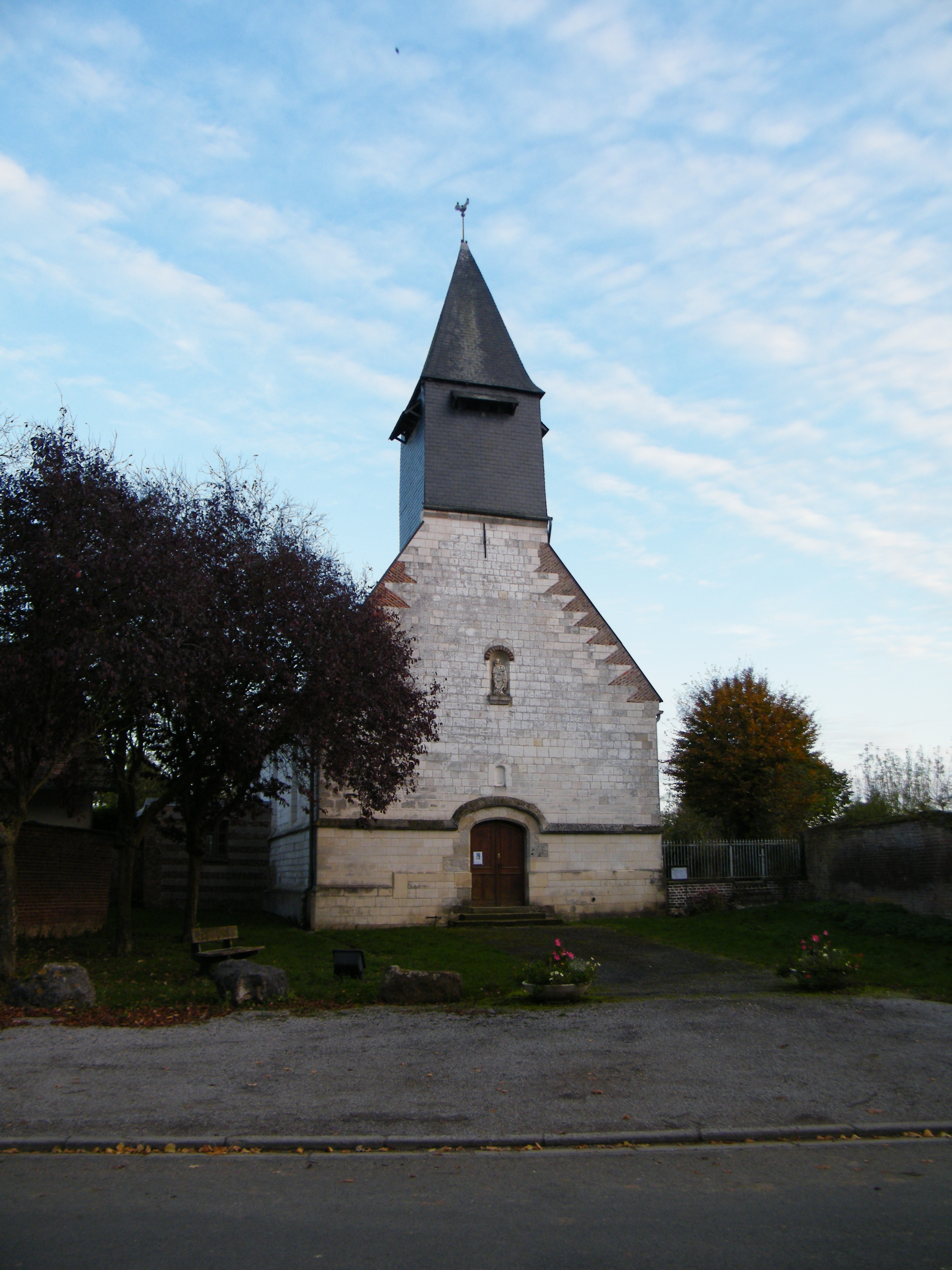 L'église.